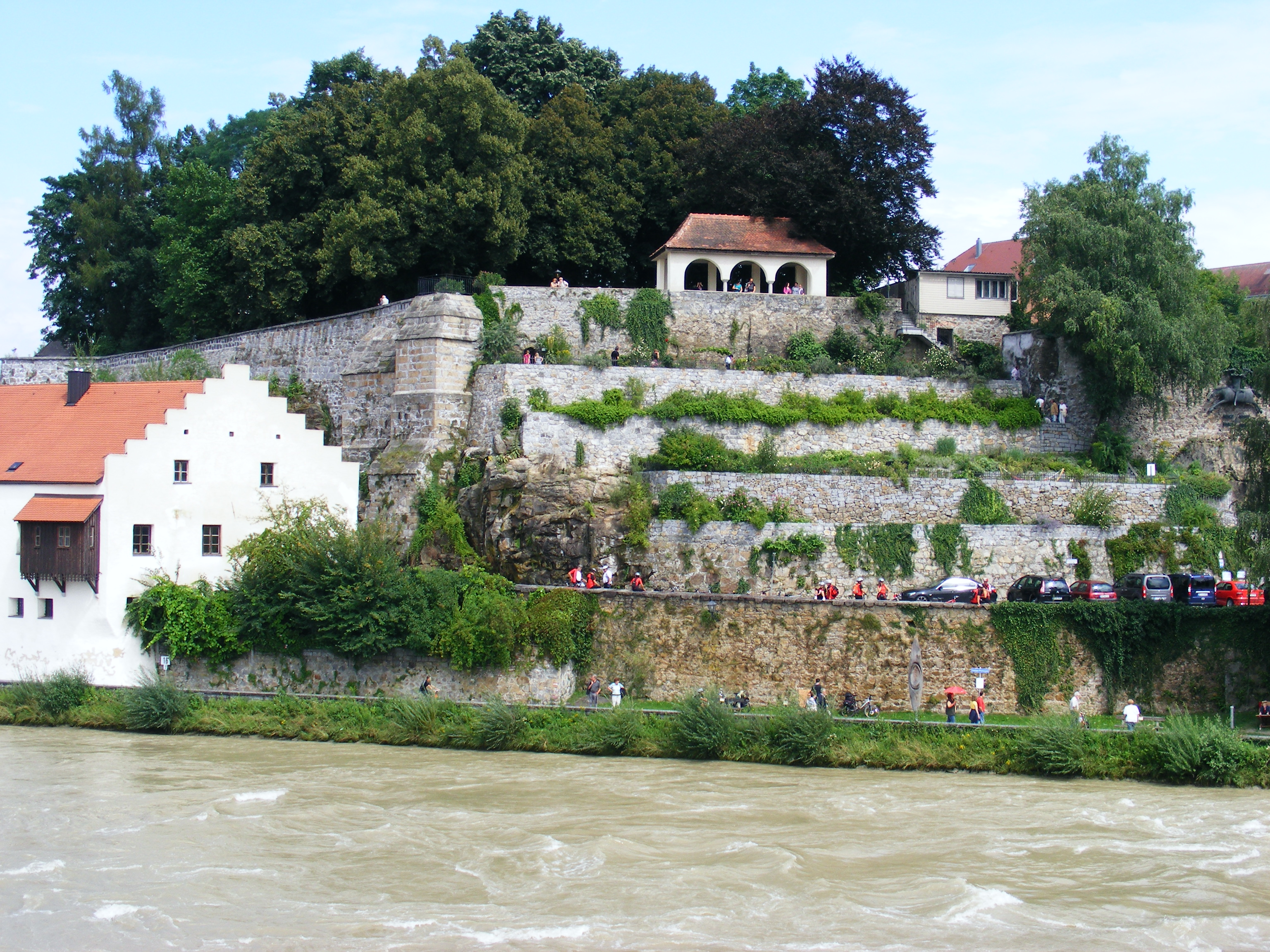 A-4780 Schärding (Oberösterreich) - Blick auf die Burganlage von der alten Innbrücke